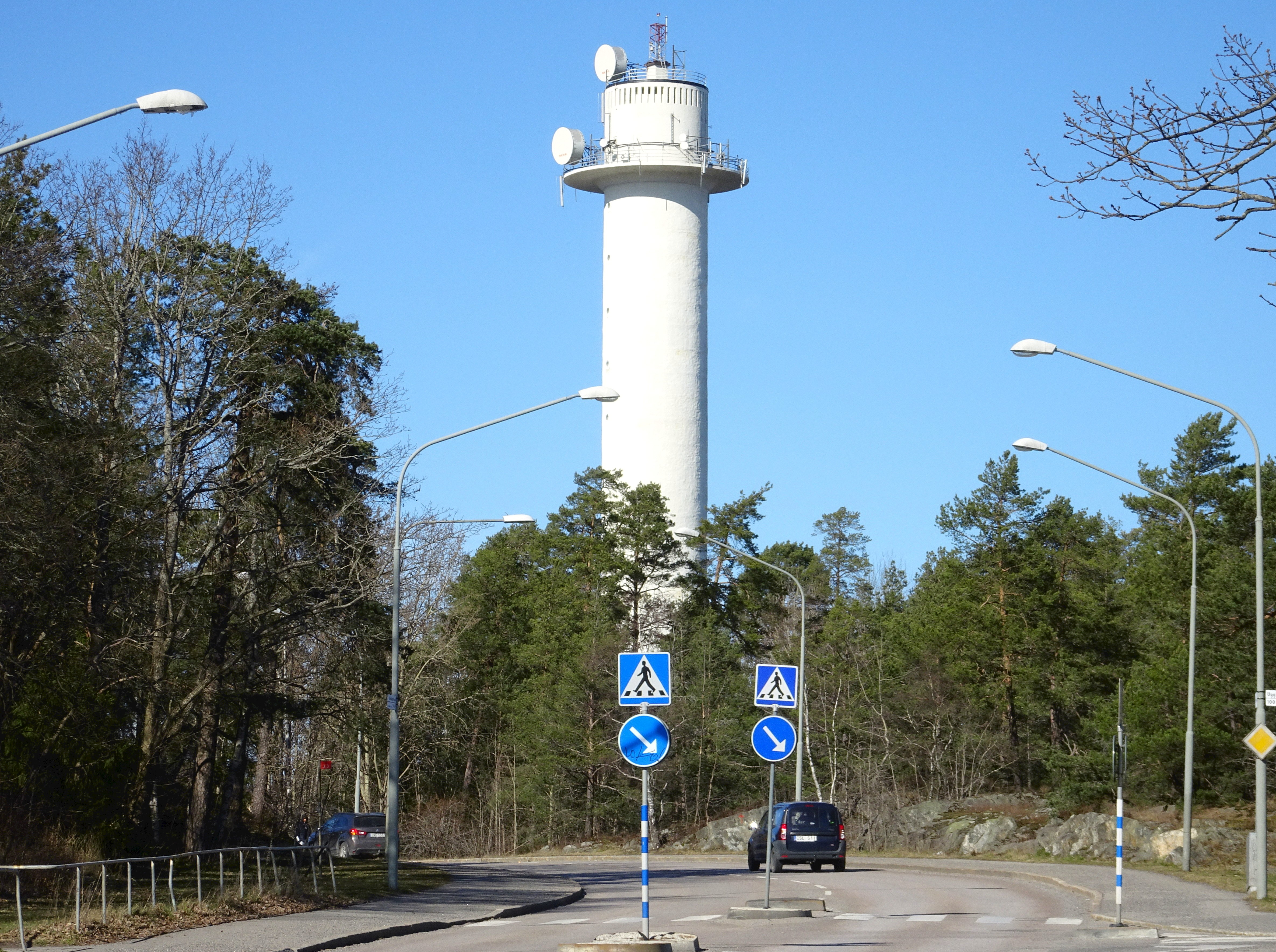 Bredängsvägen mot norr med Sätra radiolänktorn, arkitekt Jan Wallinder (1960)